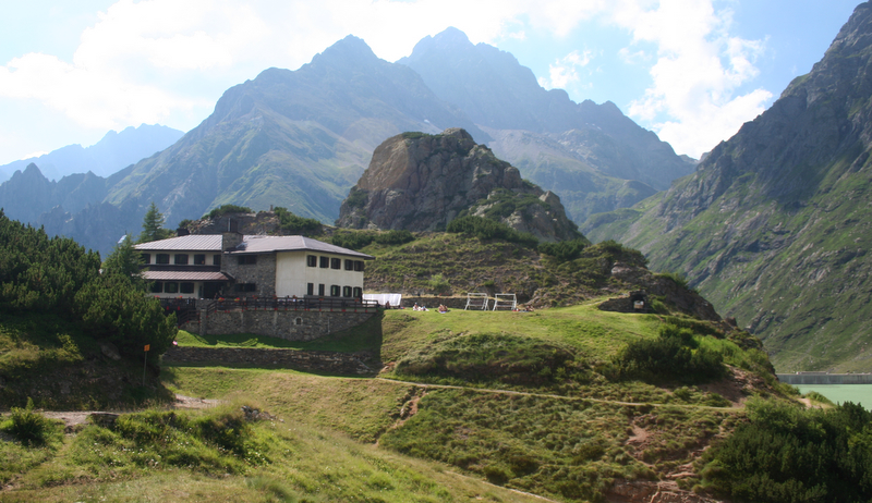 Rifugio Curò visto dal lago del Barbellino